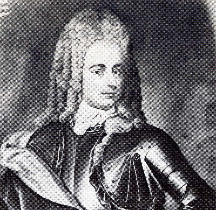 Nicolaas Harmen van Echten (1690-1742), gedeputeerde en drost van Drenthe volgens eerder gepubliceerd in de Nieuwe Drentse Volksalmanak 1900 als portret van een olieverschilderij